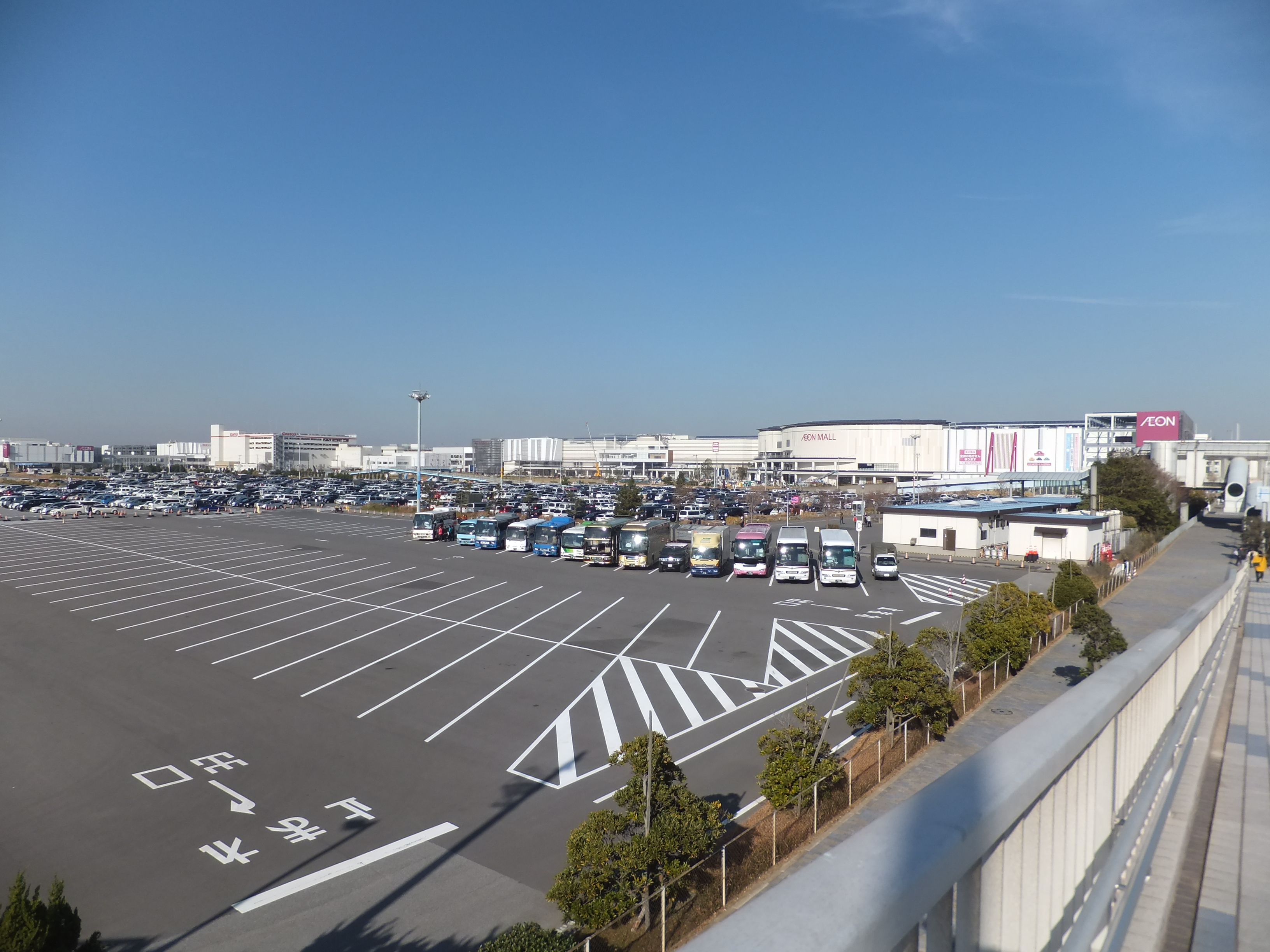 メッセ大橋歩道橋から見たイオンモール幕張新都心全景。